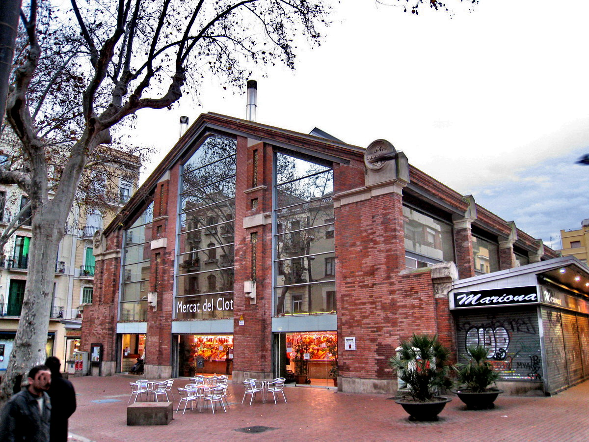 Mercat del Clot (Barcelona, Catalunya). Obra de Pere Falqués del 1884-89 (Barcelona-Catalunya)